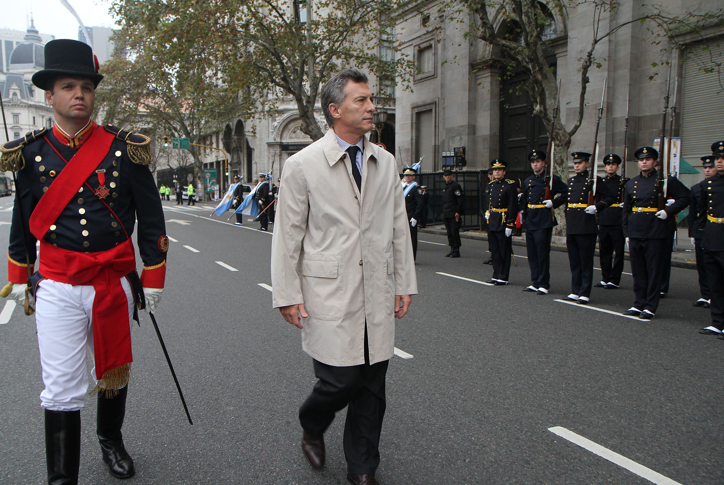 Buenos Aires, 25 de mayo de 2012.- El jefe de Gobierno. Mauricio Macri, encabezó esta mañana los actos por el 202 aniversario de la Revolución de Mayo. foto: Mónica Martínez/GCBA-Prensa